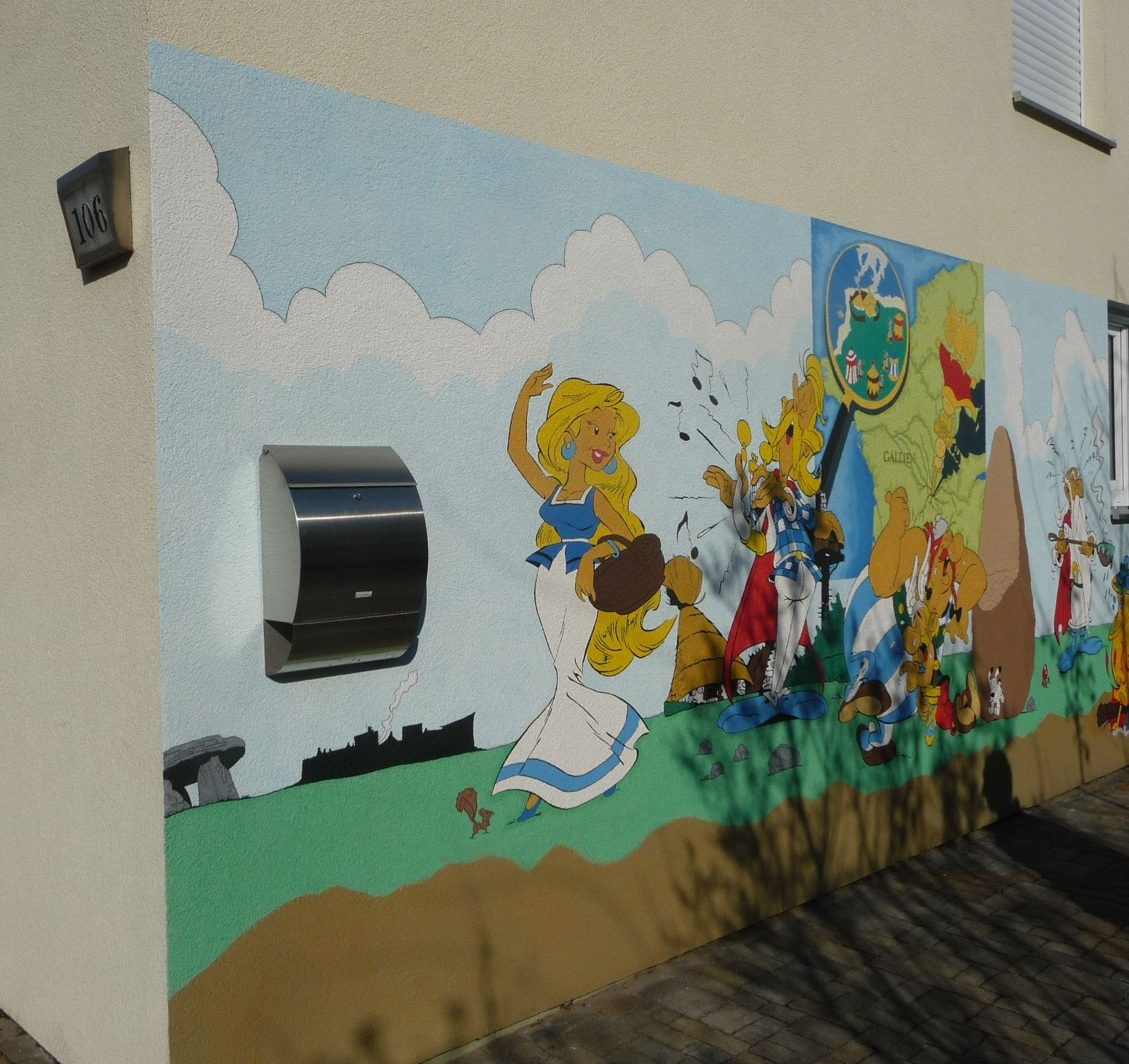 Falbala geht zum Briefkasten.